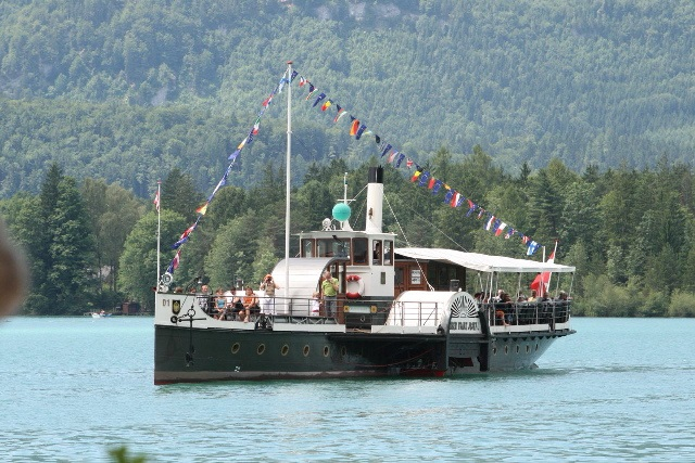 Radmotorschiff (ehemaliger Raddampfer) Franz Josef auf dem Wolfgangsee